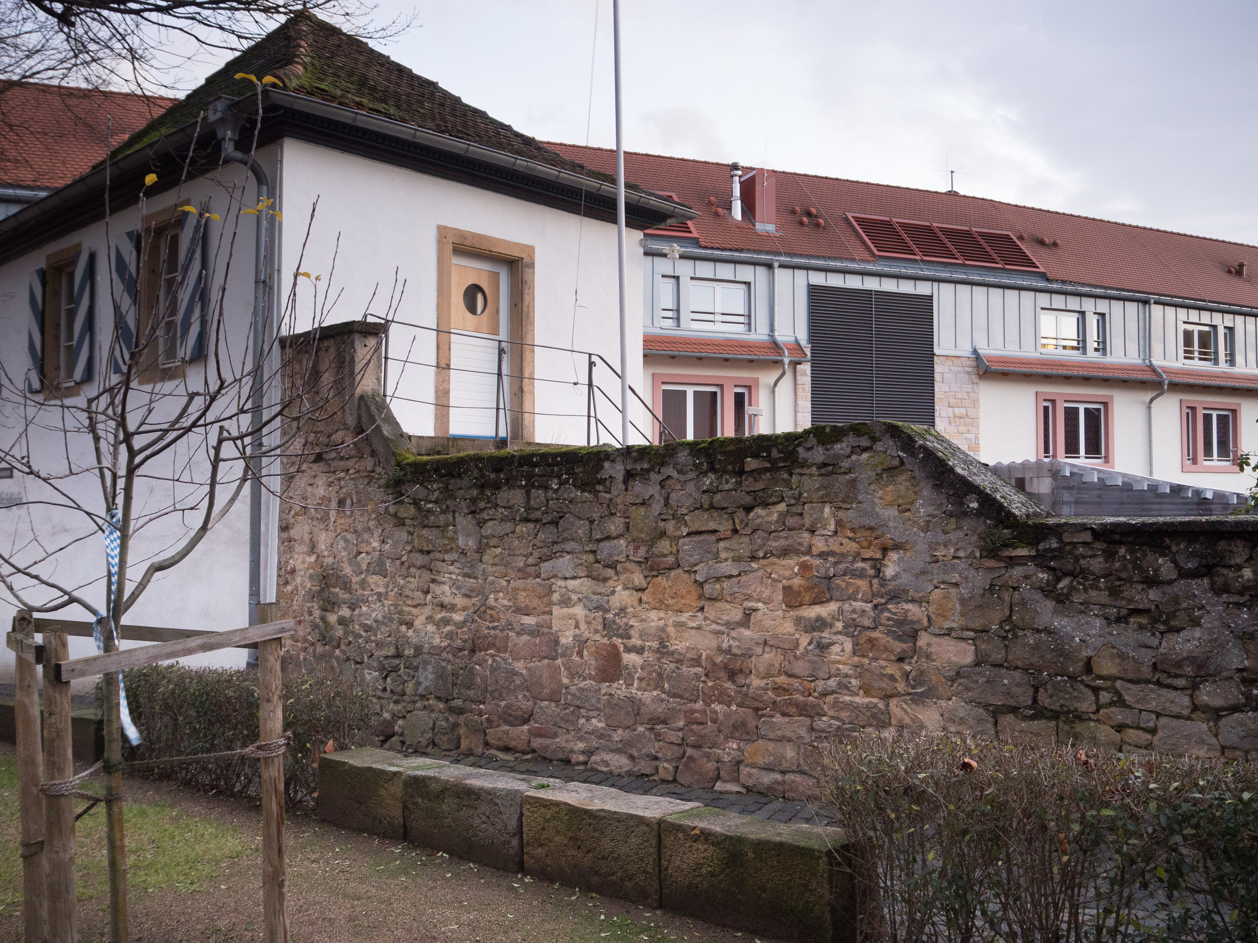 Altes Zollhäuschen in Deidesheim